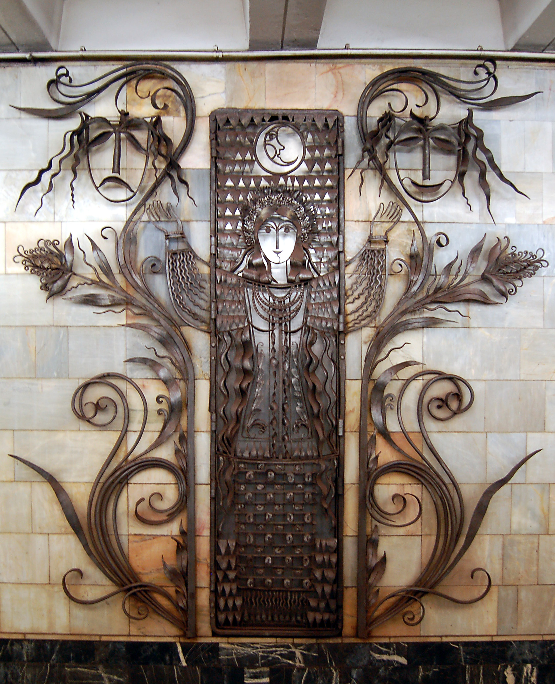 Станция метро «Оболонь», ковка на путевой стене платформы в сторону станции «Минская»